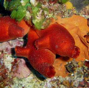 Urochordata (Image personnelle)